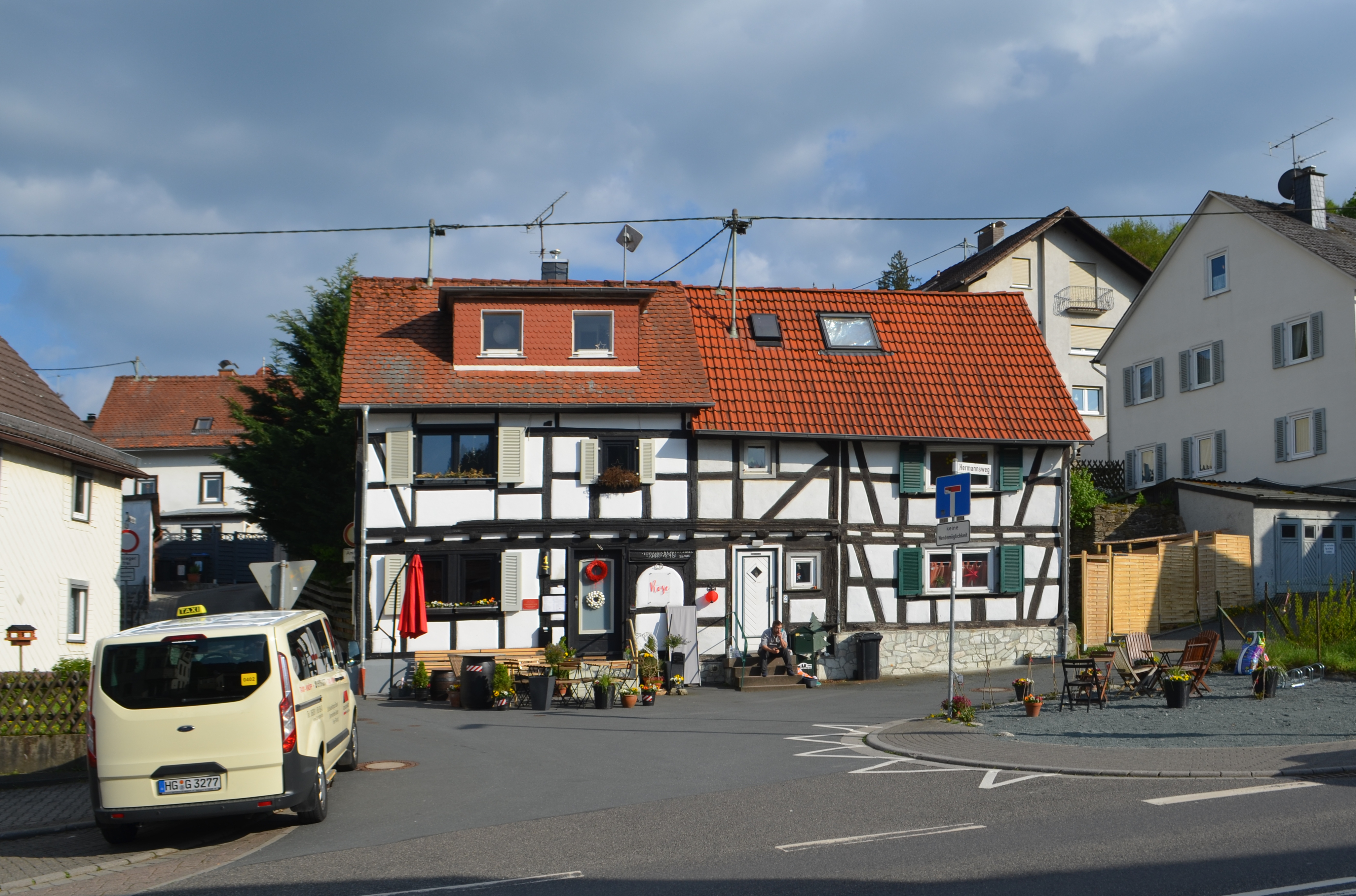 Schmitten, Hermannsweg 1-2 (2019)